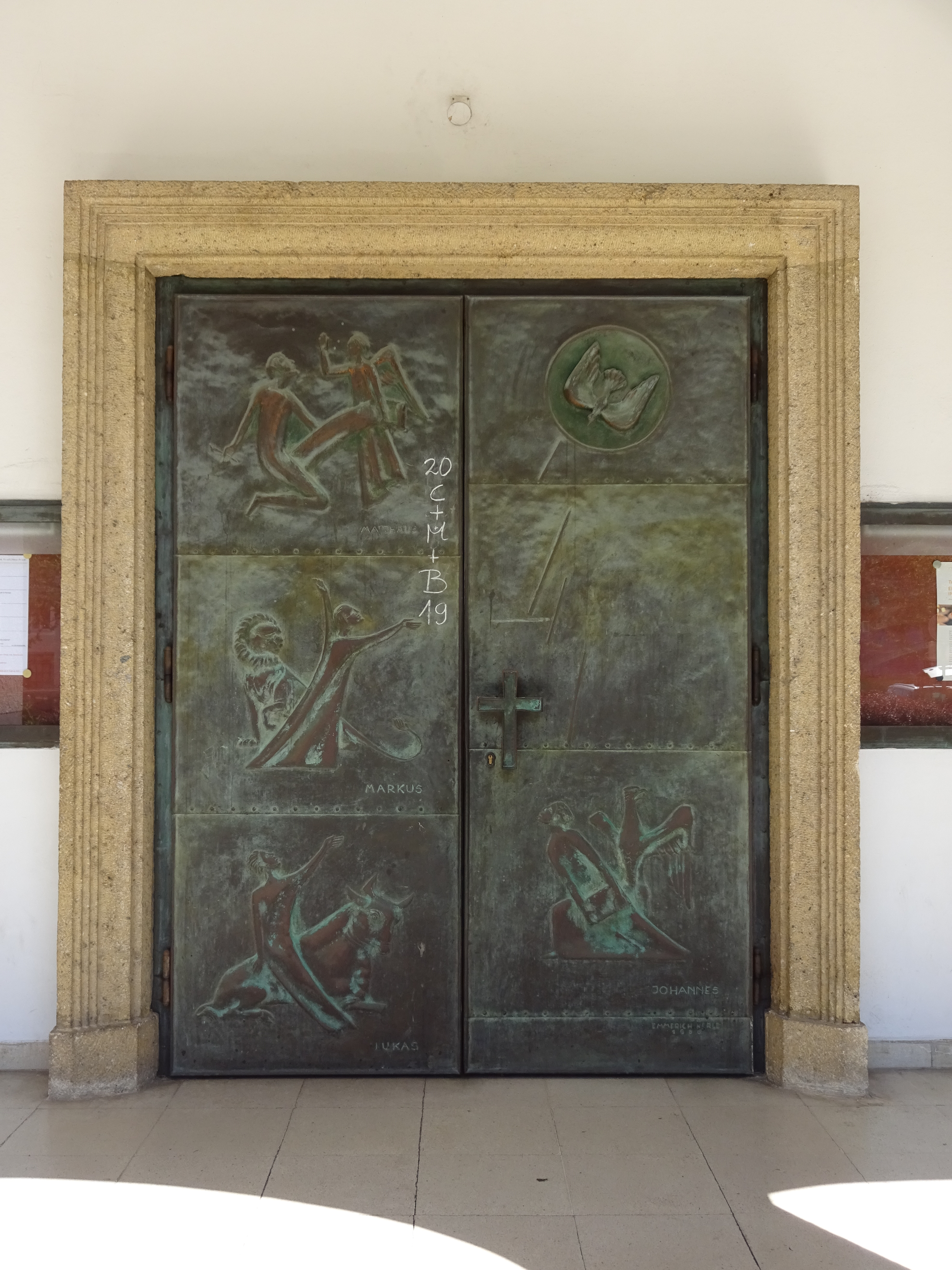 Schutzengelkirche, Innsbruck-Pradl, Portal mit Reliefs der vier Evangelisten von Emmerich Kerle, 1966